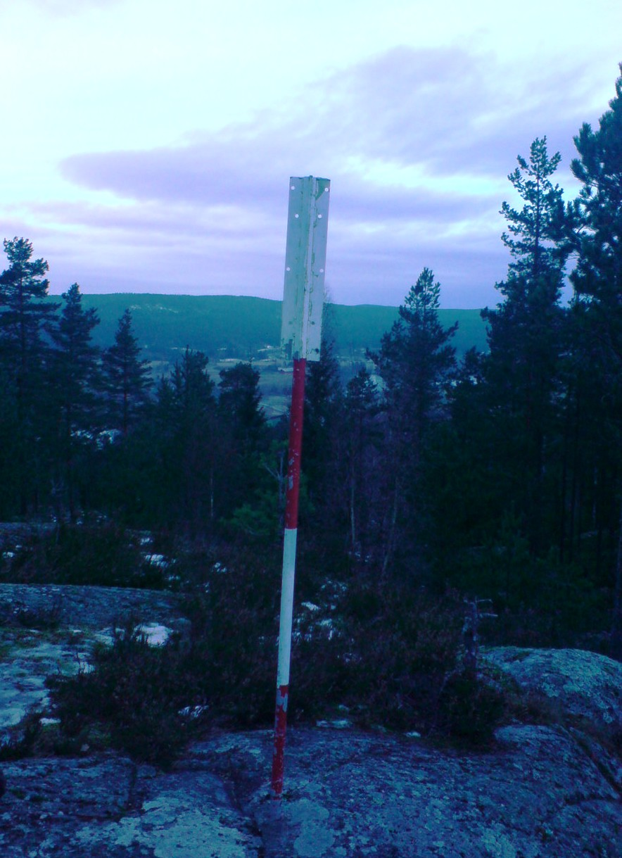 Foståskollen ved Fosser i Aurskog-Høland kommune.